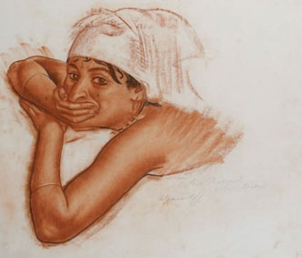 Fatima à Colomb Bechar бумага, сепия 48.50/64.00 см